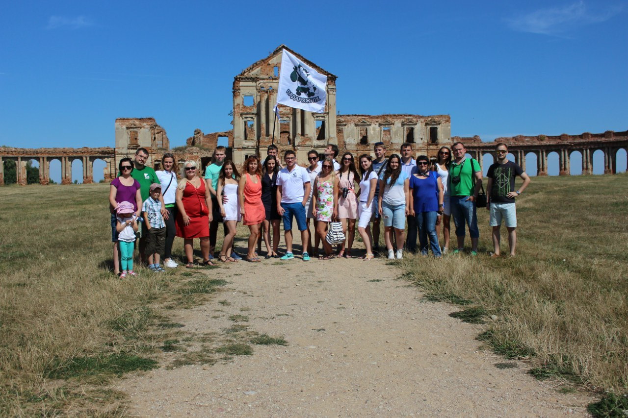 Клуб Падарожнік у Ружанах